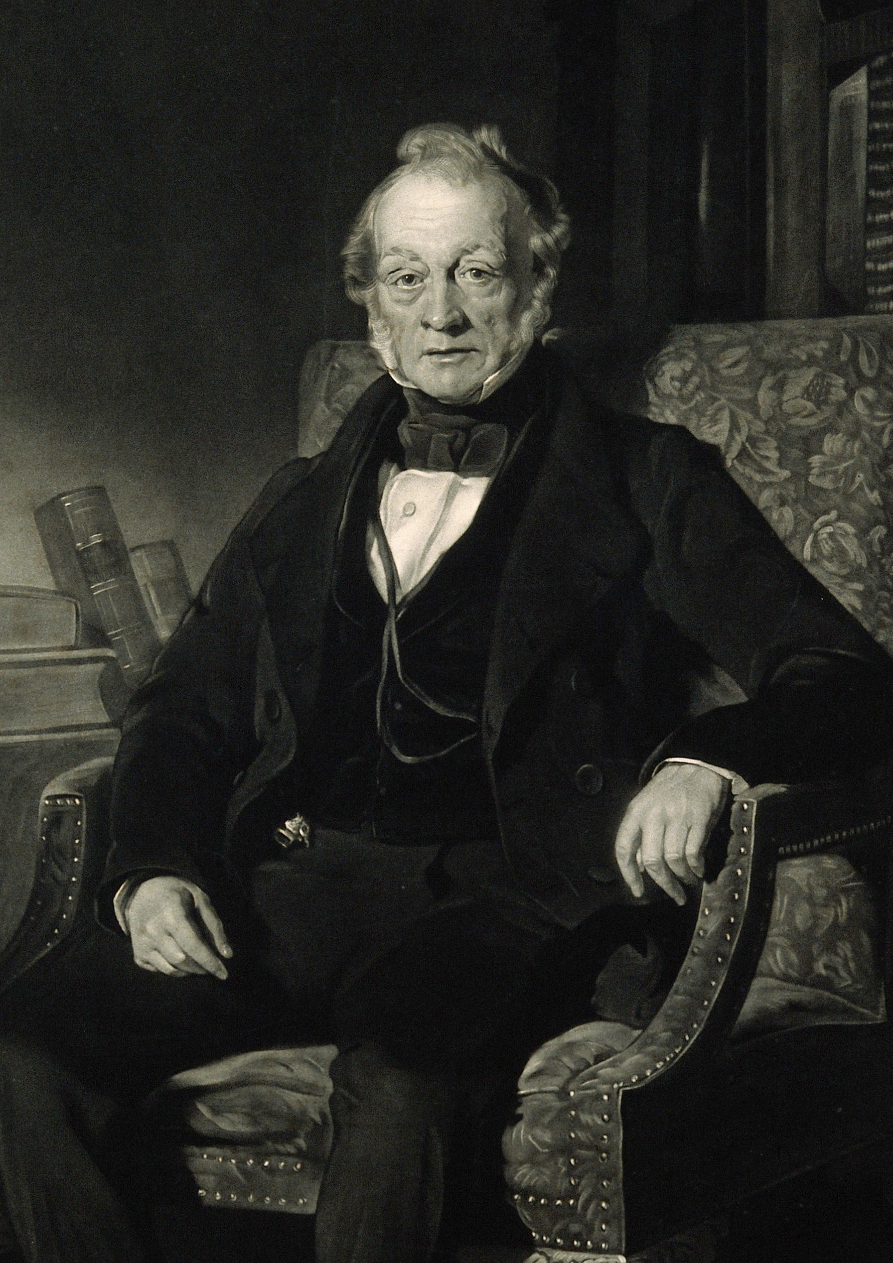 Sir Robert Keate